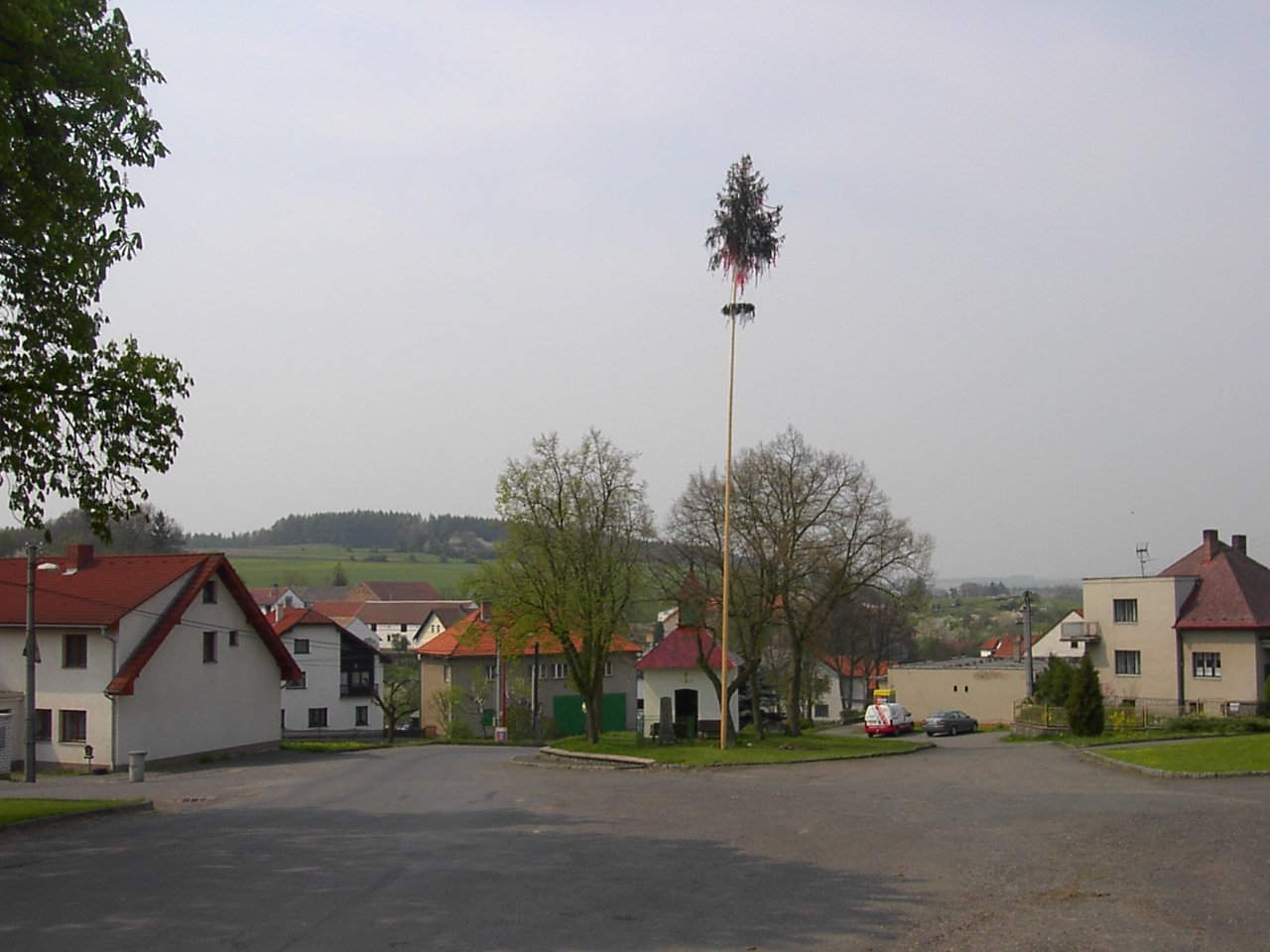 Kaplička na návsi v Dalekých Dušníkách. (okr. PB)